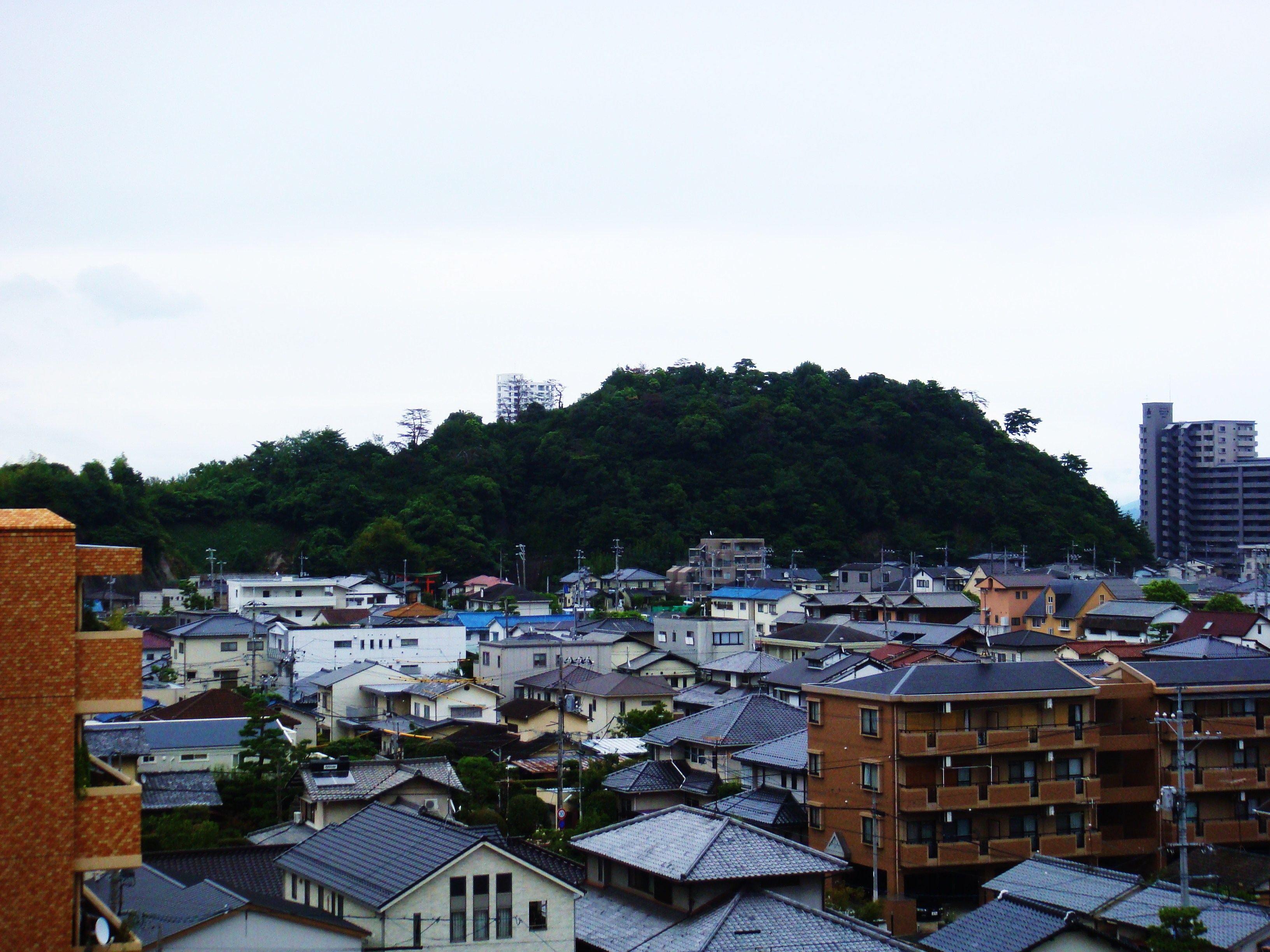 五日市のクジラ（海老山） Itsukaichi whale(Mt.Kairo)